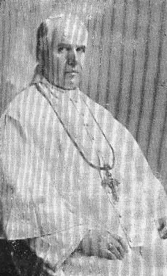 Pavel Jan Souček (1877 - 1943), Český římskokatolický kněz.